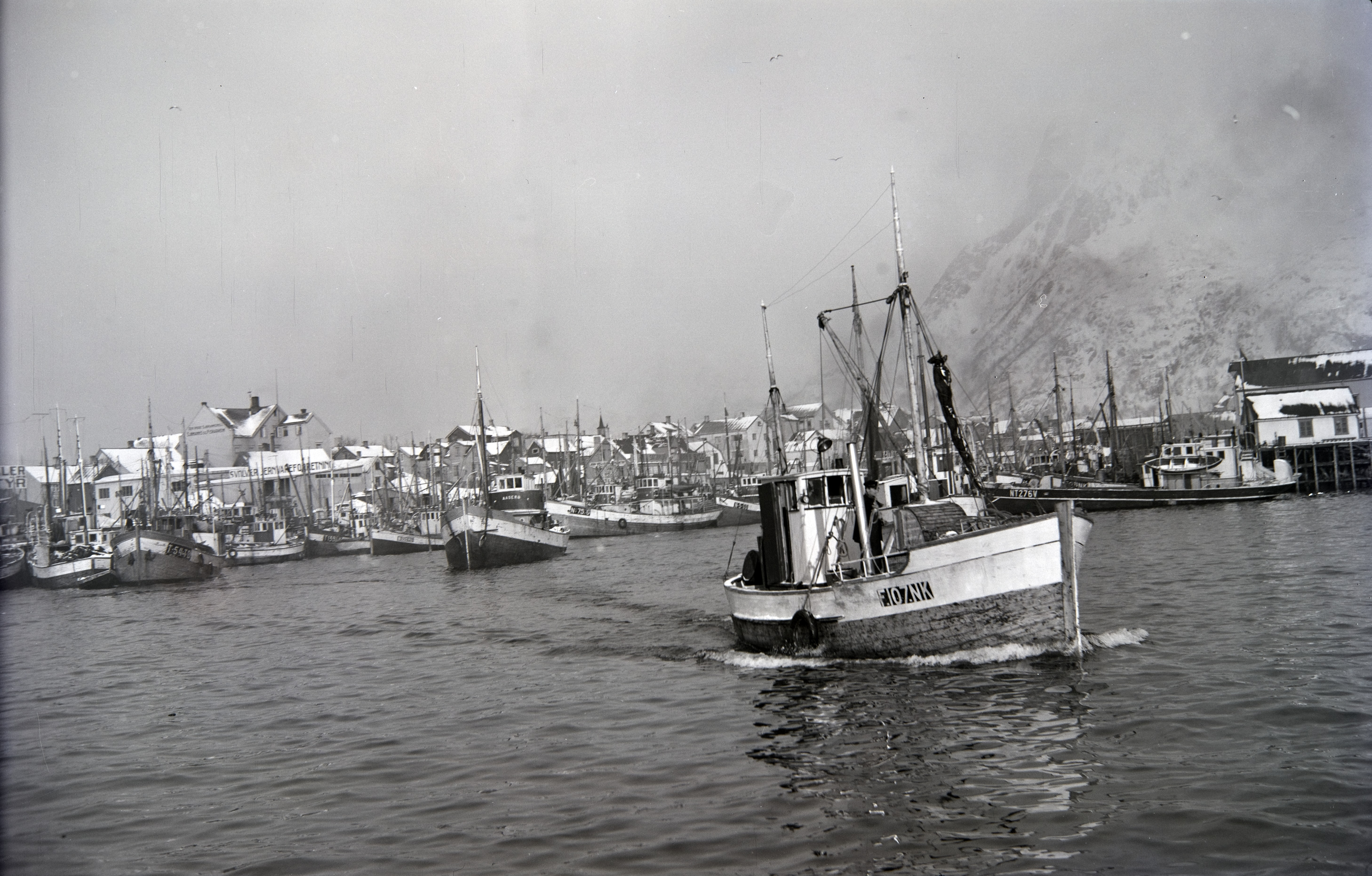 Bildet er hentet fra Nordlandsmuseet bildesamling etter Kanstad. Motivbeskrivelse: Båter, i fgr. motorskøyte "Bris" F 107 NK (Nordkapp) Nøkkelord: Båter og fartøyer Havnevesen